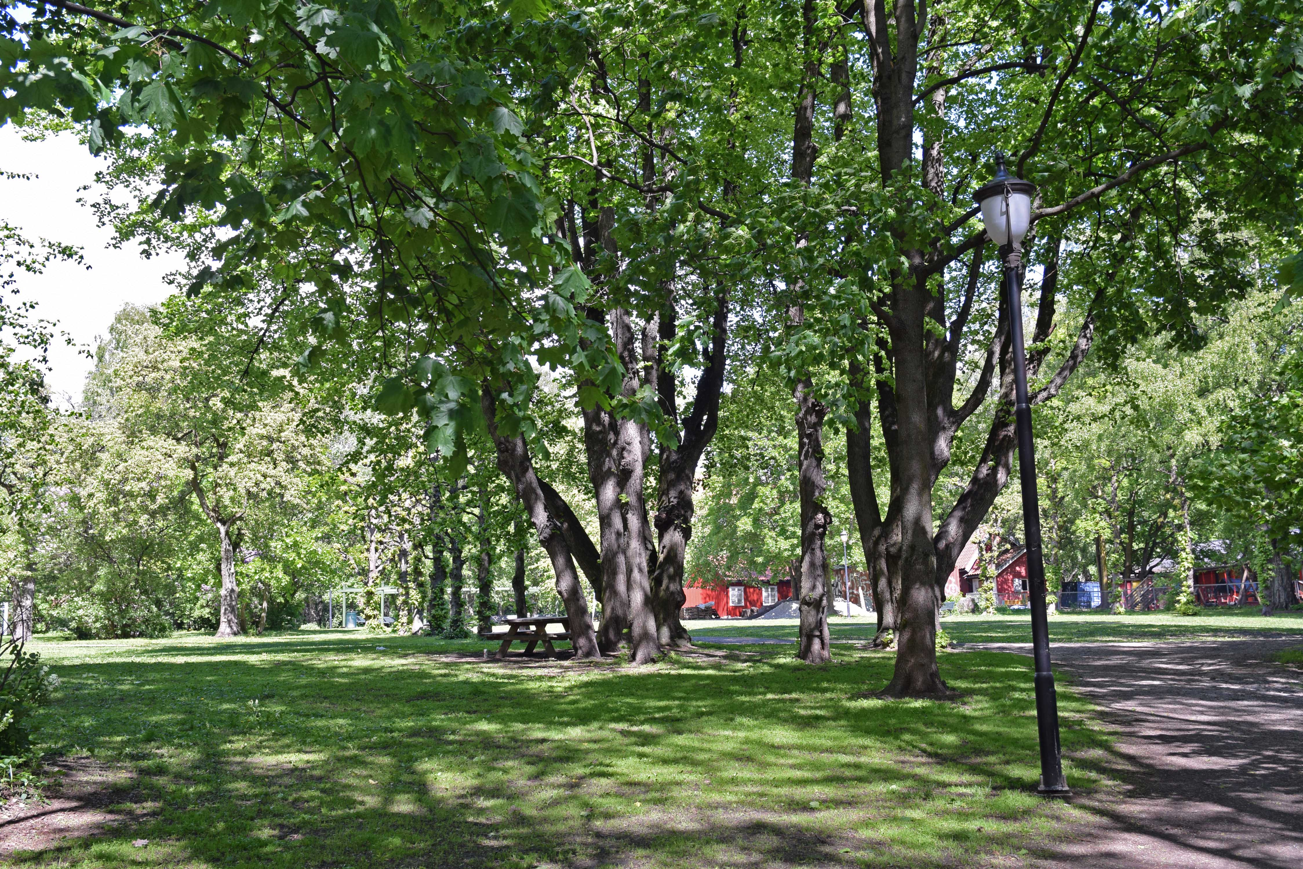 Hallénparken er en park på den tidligere løkkeeiendommen Vennelyst på overgangen mellom Grünerløkka og Torshov i Oslo.